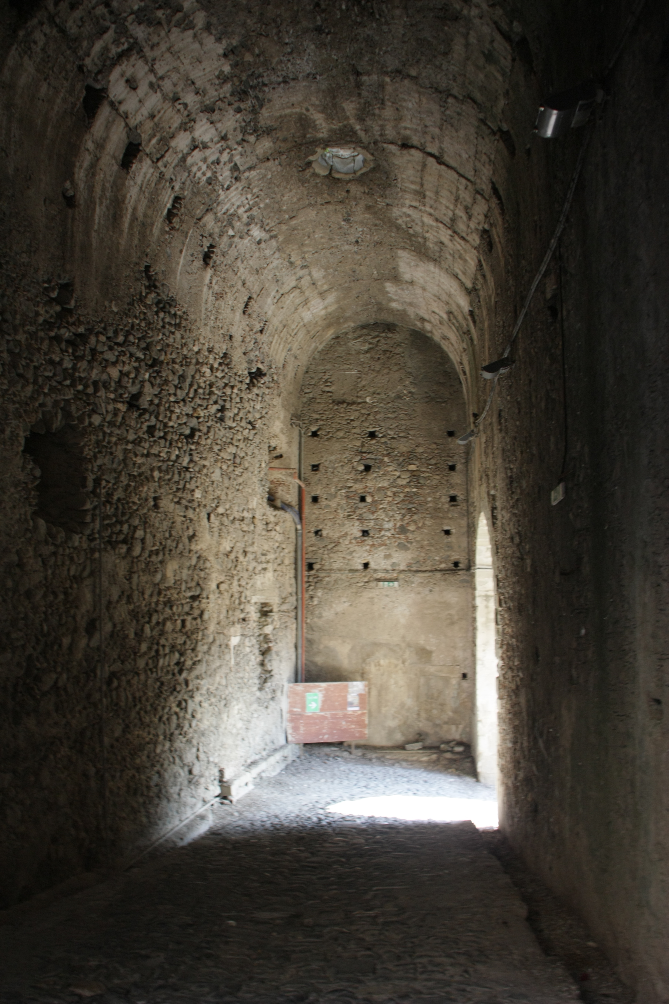 tunnel di accesso al castello di Milazzo